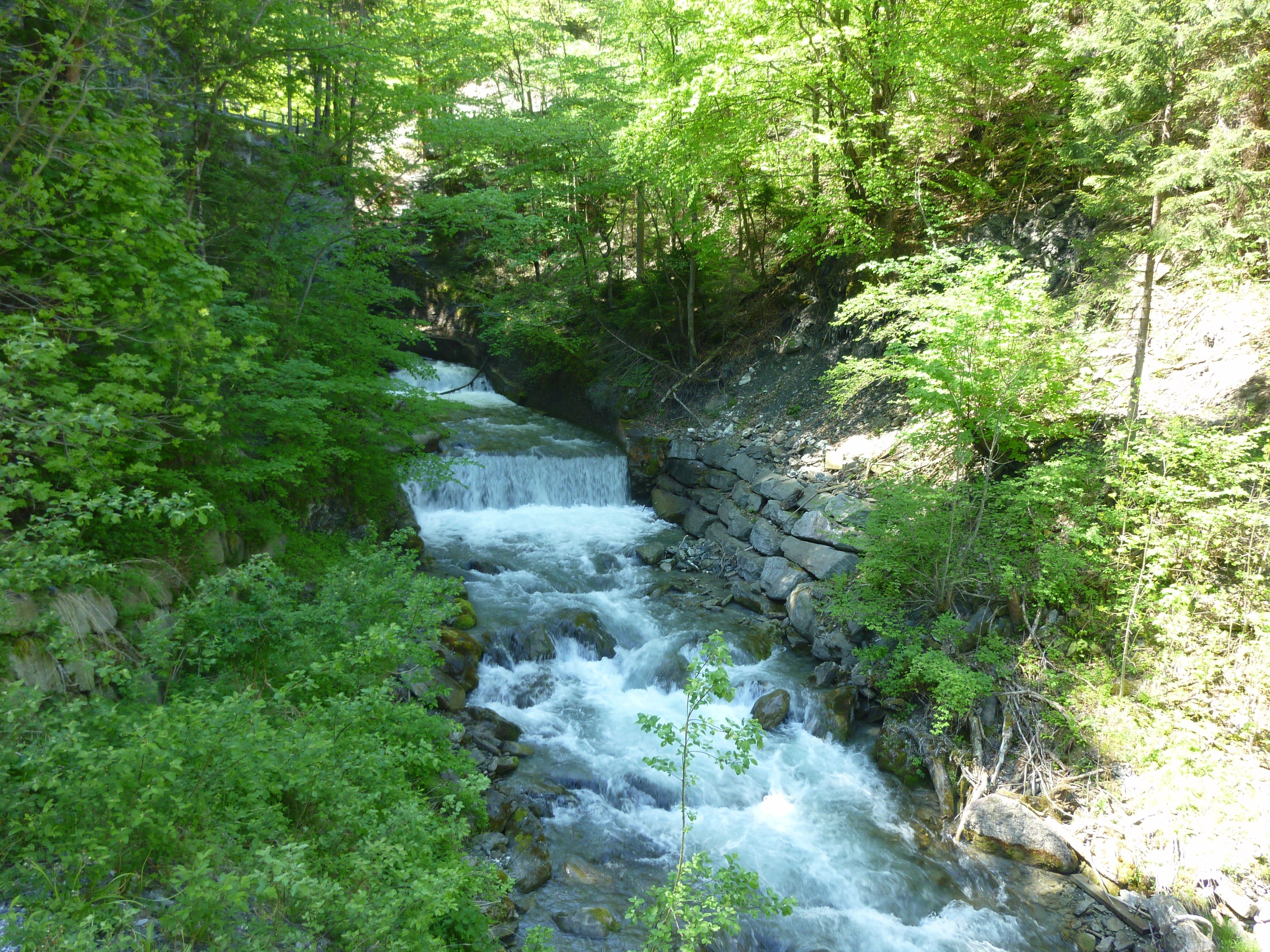 Rabiosa in der Schlucht von Passugg